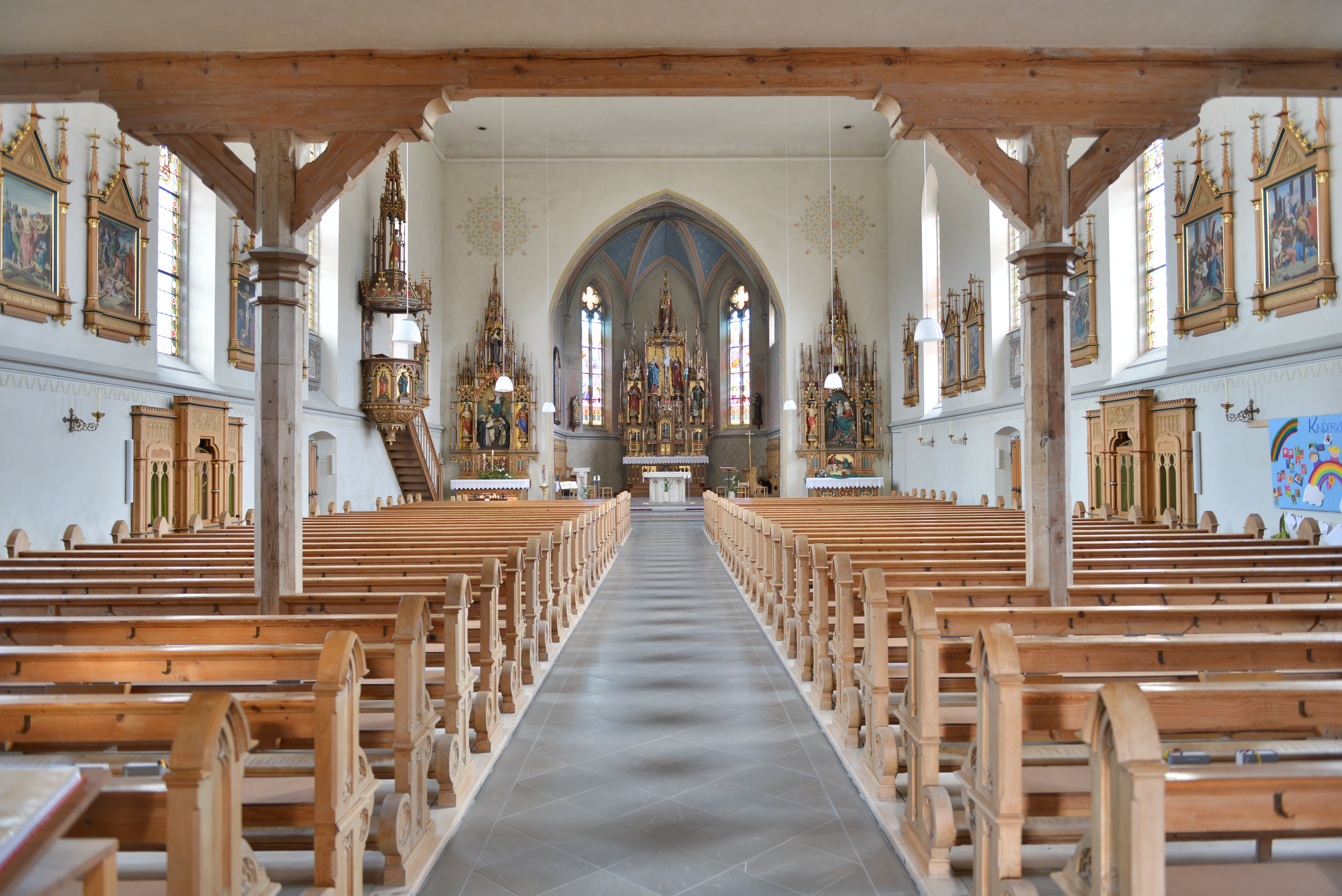 Pfarrkirche hl. Nikolaus von Egg (Vorarlberg), 1890-1892 Neubau nach Plänen von Anton Gamperle durch Baumeister Fidel Kröner. Rieger Orgel von 1964.